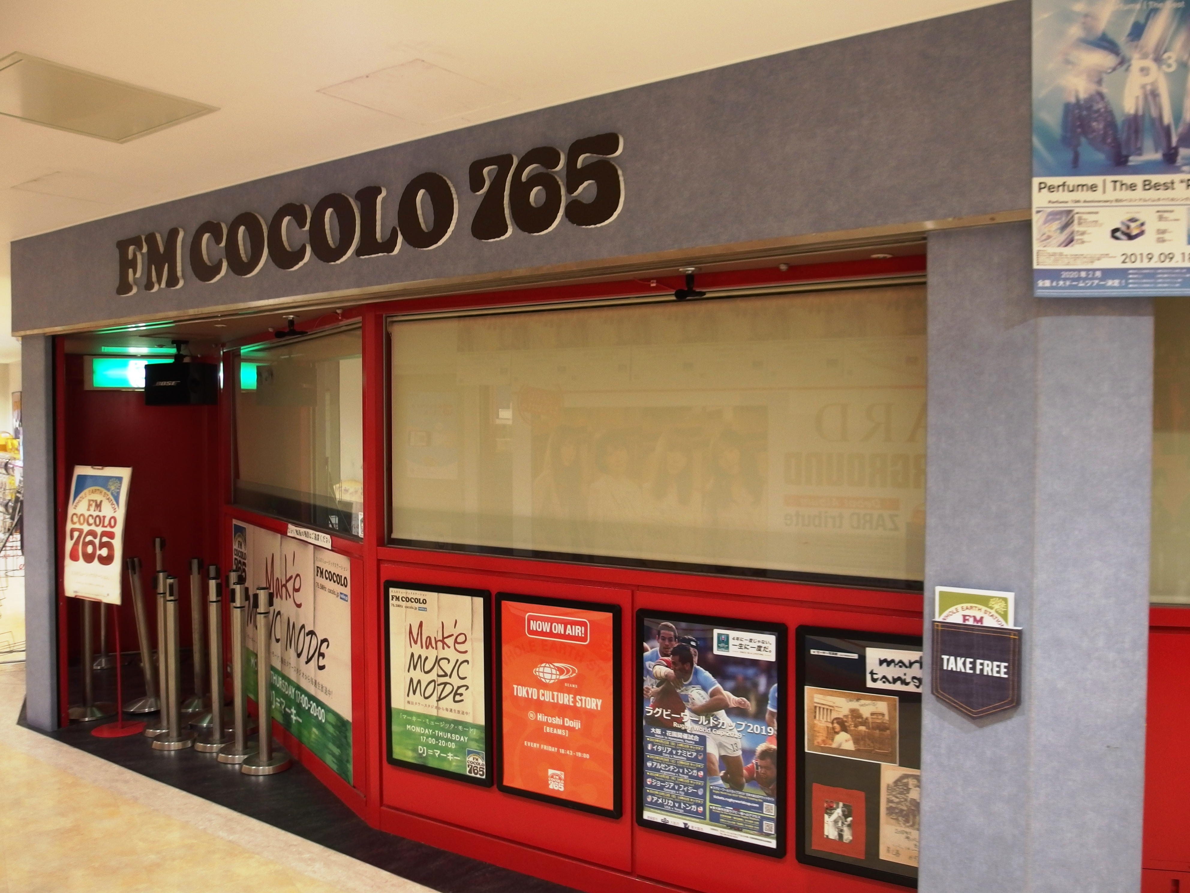 大阪市にあるタワーレコード梅田大阪マルビル店に併設されている梅田タワースタジオ。